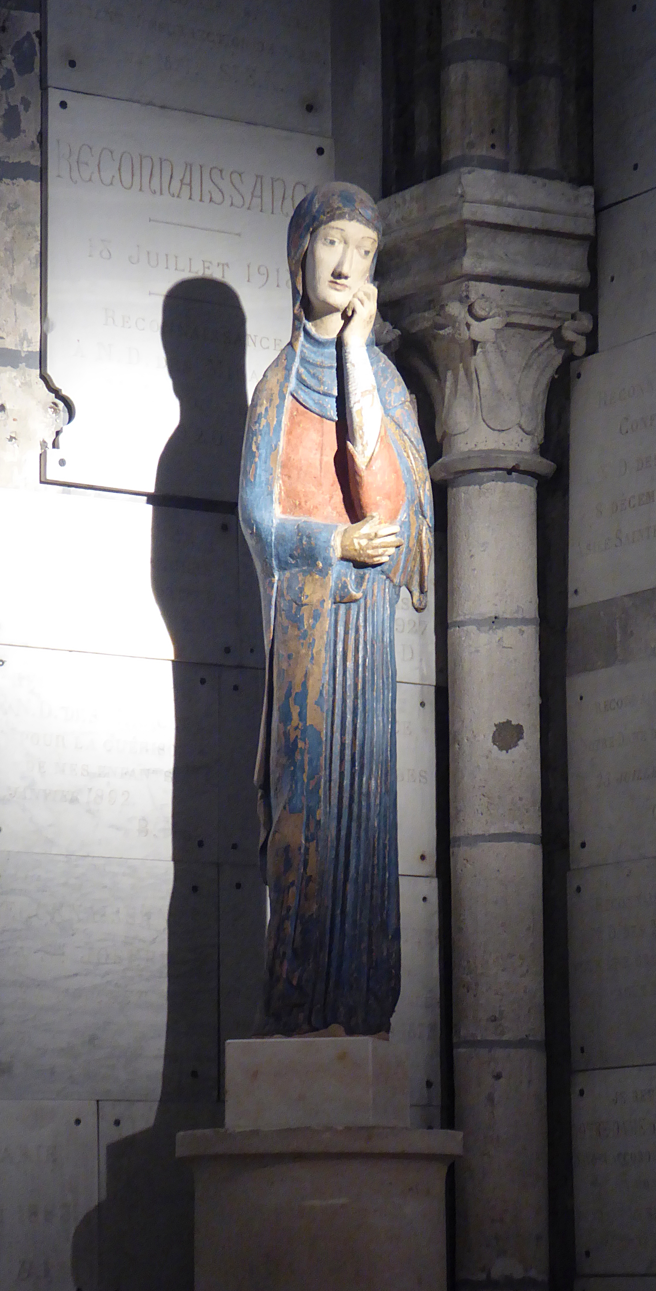 Dans l'église Saint-Nicolas de Saint-Maur-des-Fossés, statue de la Vierge, datant du 12ème siècle, dont une légende du 14ème siècle raconte qu'elle a été réalisée miraculeusement par une intervention divine.